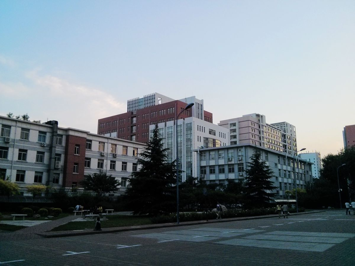 2014年6月天津医科大学校园